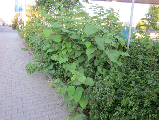 Reynoutria x bohemica überwuchtert Bestand anderer Pflanze